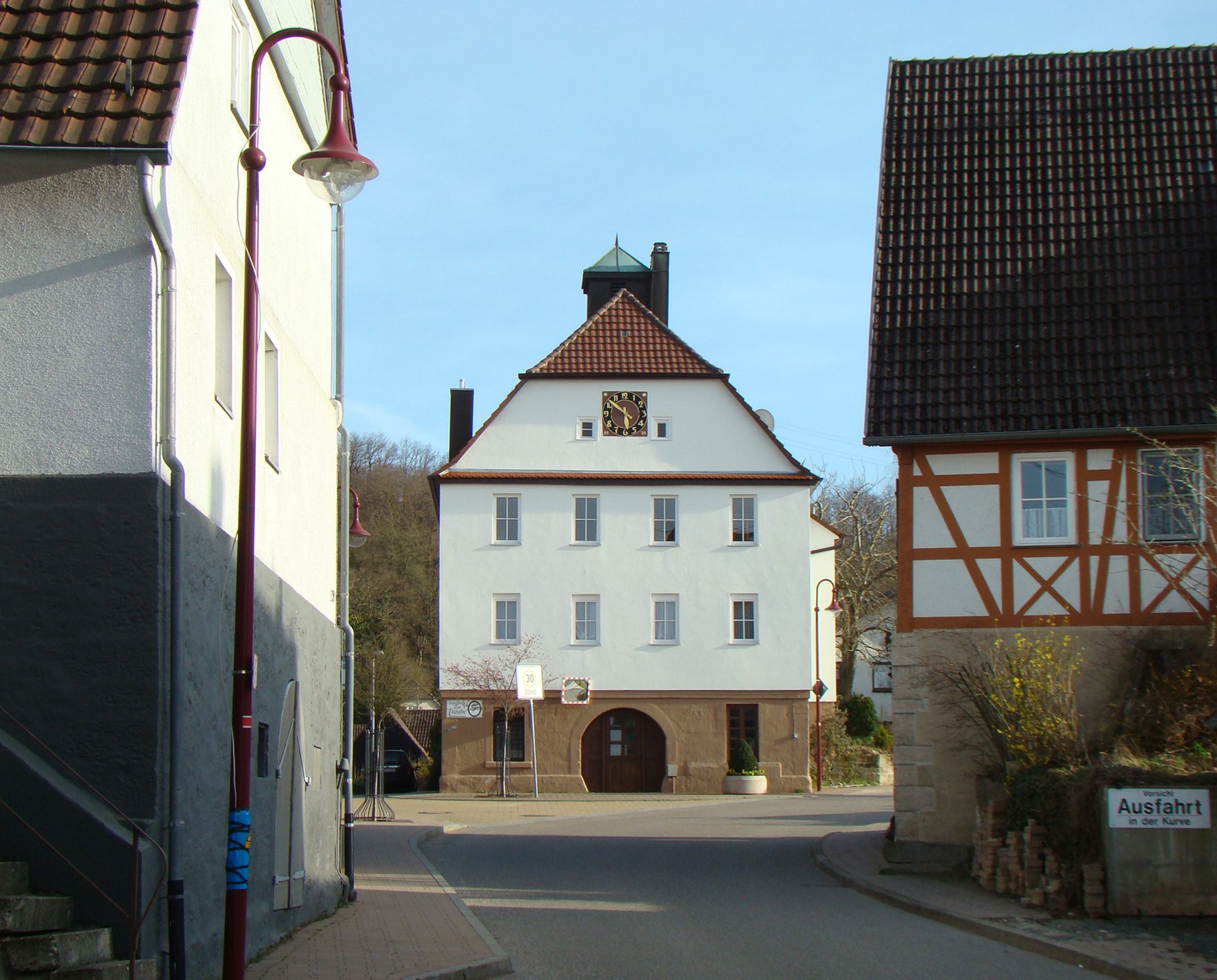 Blick zum alten Schul- und Rathaus in Obersulm-Eichelberg, rechts das ehem. Gasthaus Adler